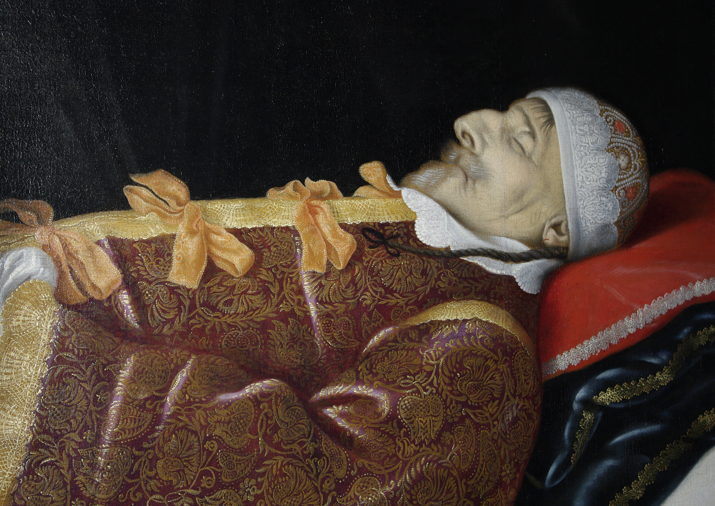 Danish King Christian IV, who died in 1648.